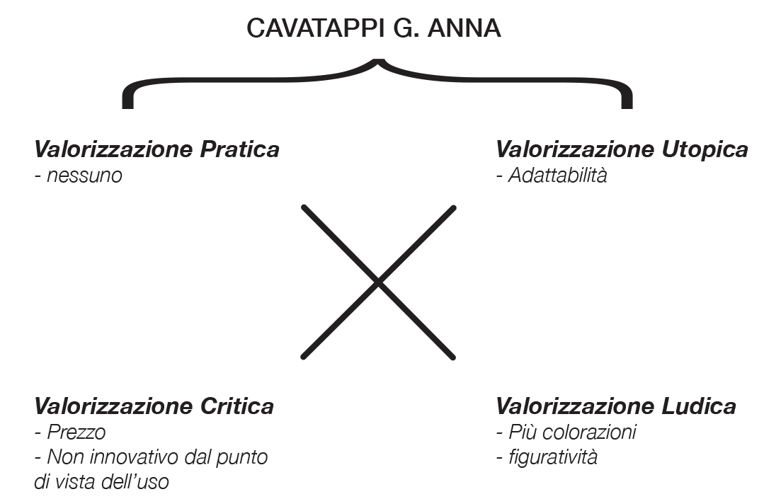 rappresentazione del quadrato di flosch del prodotto industriale Anna G.